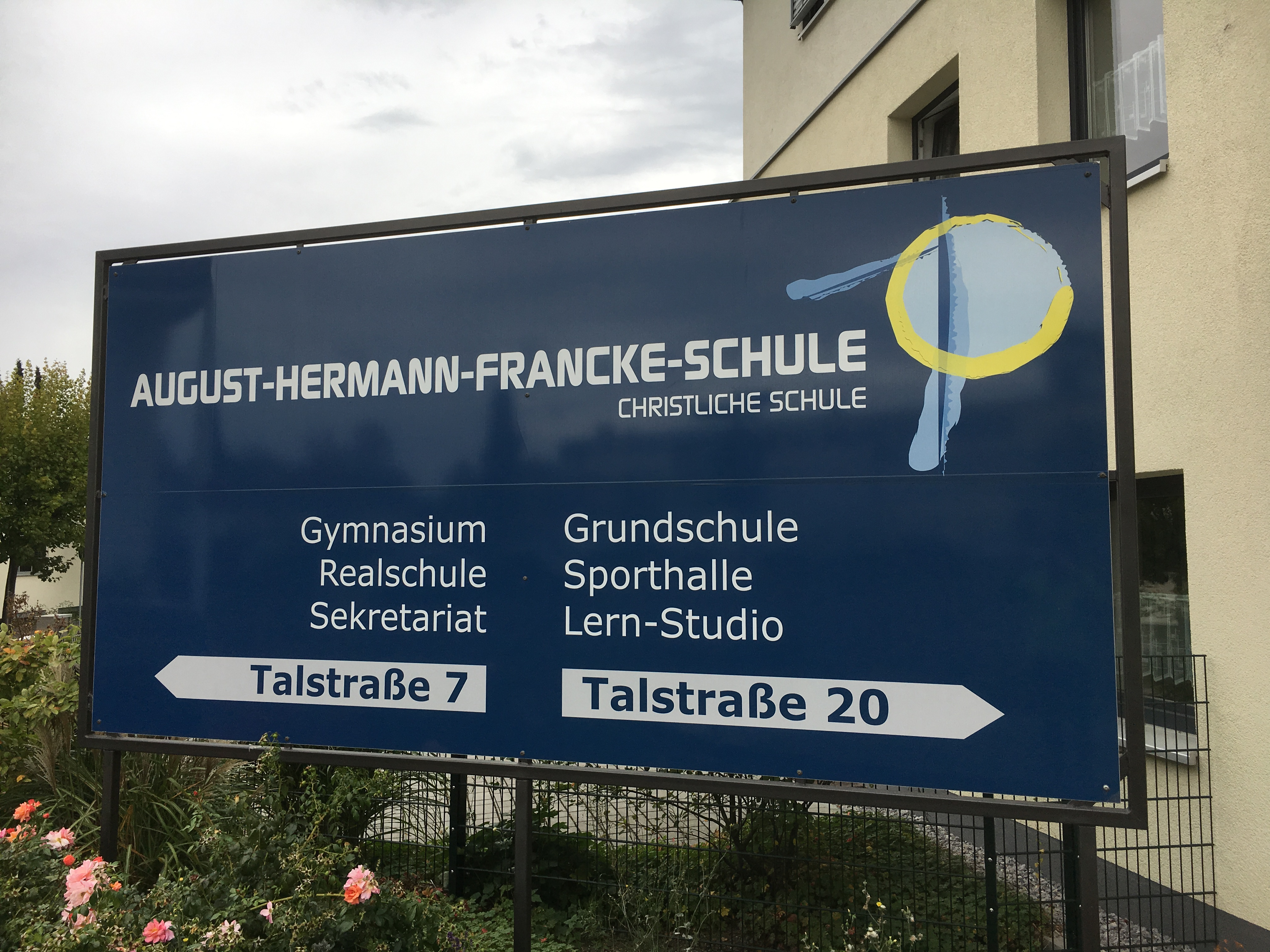 AHFS Gießen, Schild